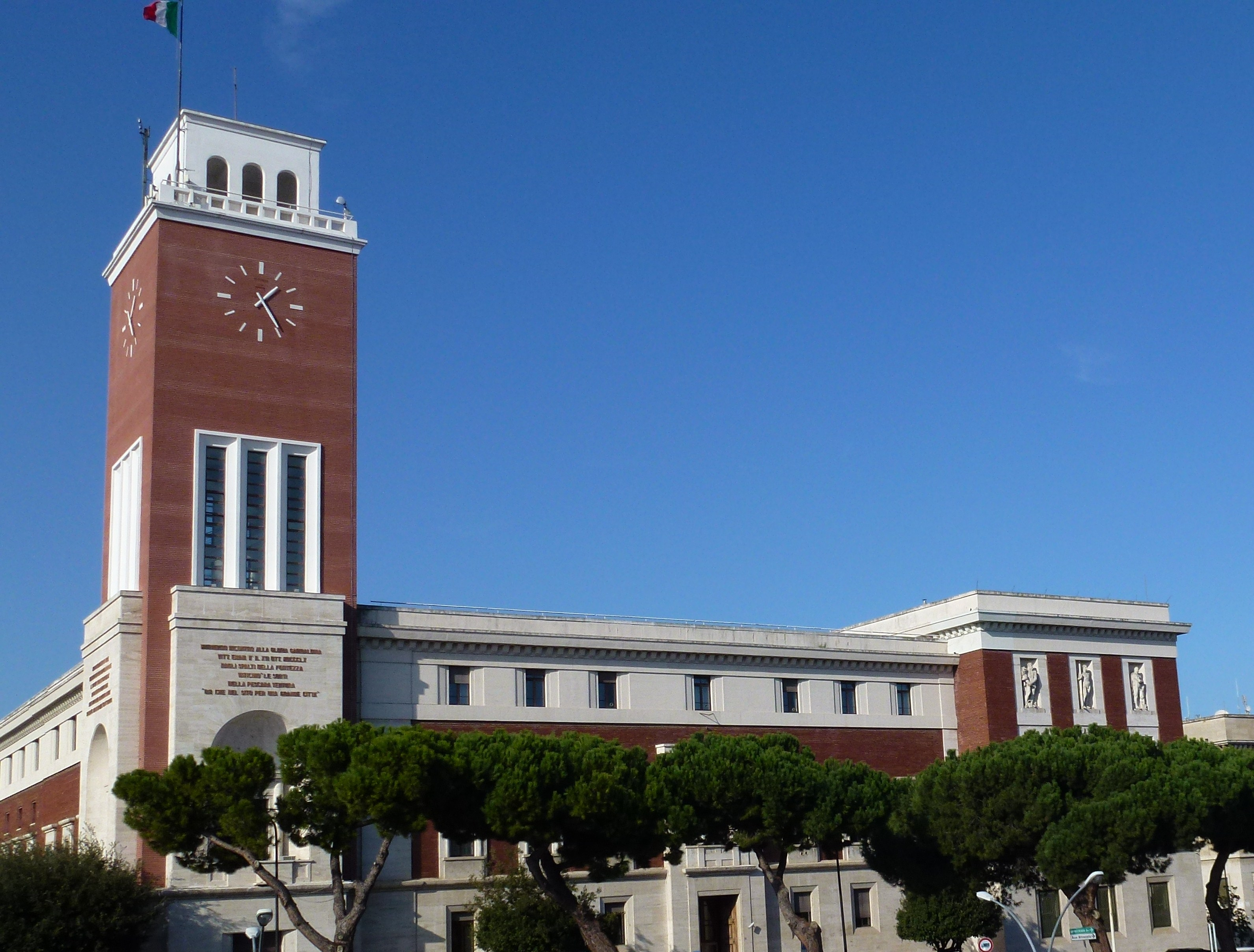 Palazzo del Municipio